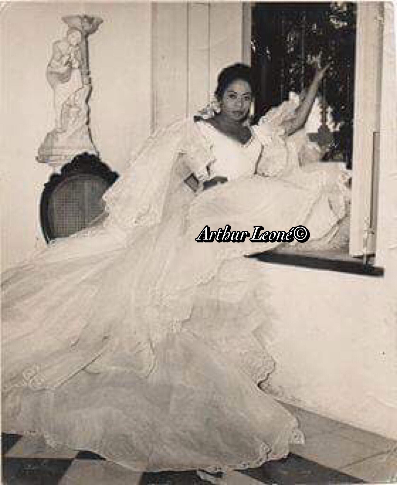 Xiomara Alfaro en una bata Cubana, en el Cabaret de Tropicana.